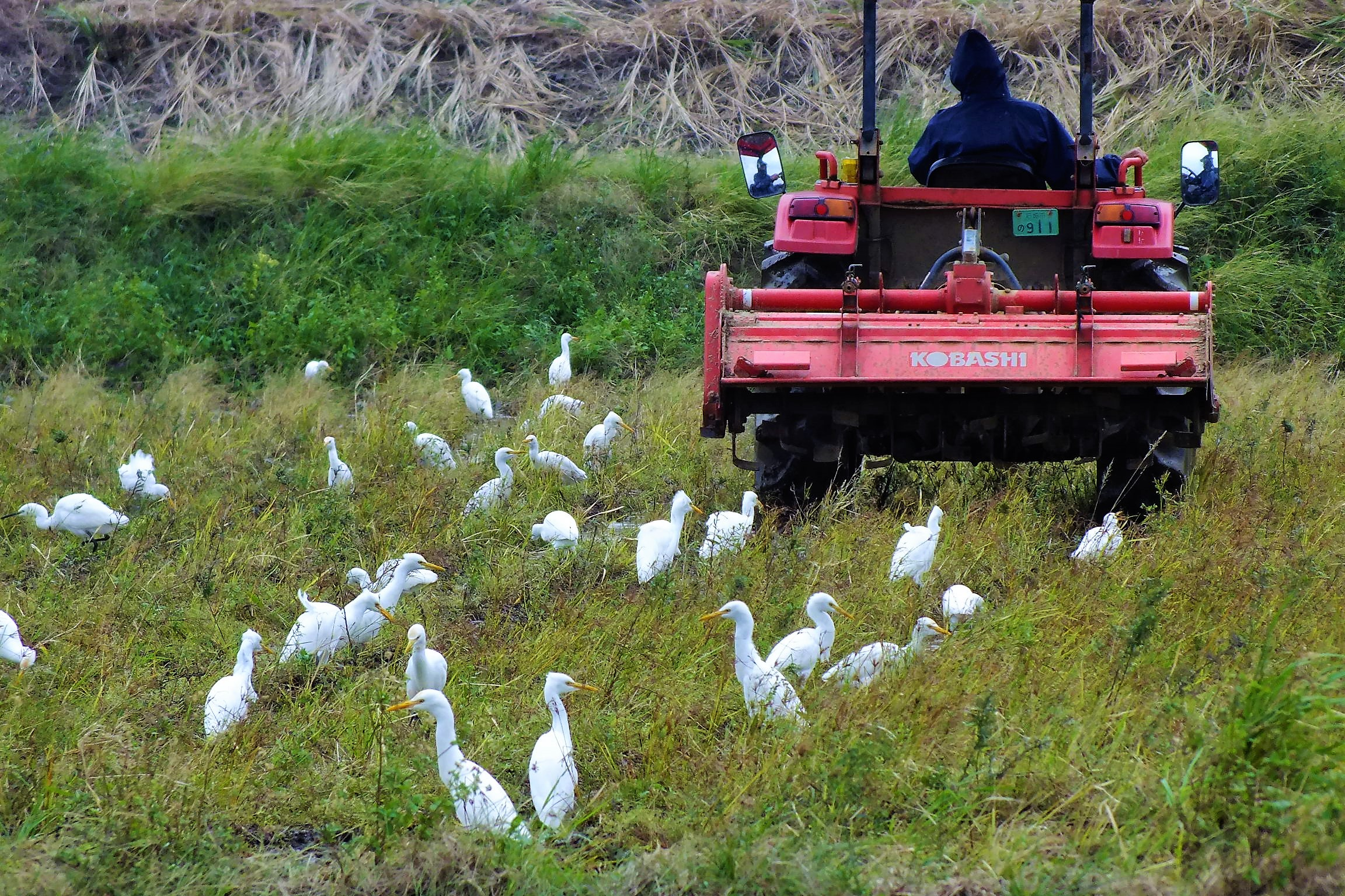 Ardea alba modesta of Japan in Ishigakijima 石垣島の白鷺